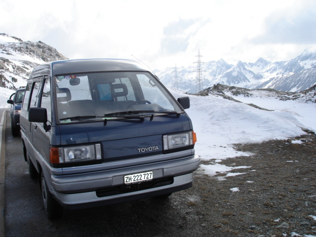 Toyota Liteace DX, 1991 MY, Modelcode KM30